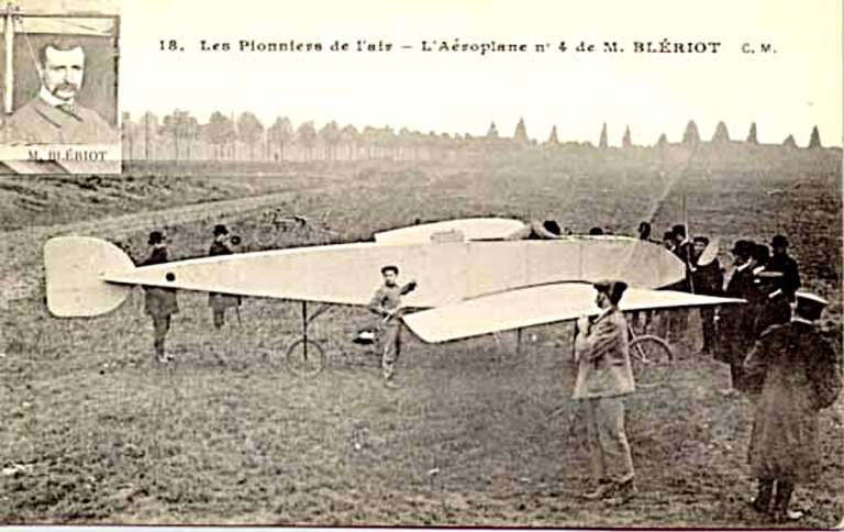 Blériot No.VII.